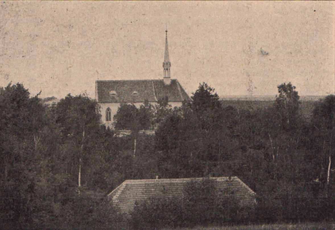 Kostel svatého Jakuba Většího v Otrubech (část Lidice Menší či Lidický dvůr).